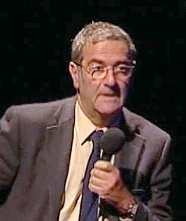 Le physicien français, professeur au Collège de France et prix Nobel de physique 2012, Serge Haroche, lors de sa conférence intitulée Atome et lumière donnée le 4 mai 2009 au Théâtre de la Commune d'Aubervilliers dans le cadre des « Lundis du Collège de France » (année 2008-2009, cycle Concepts et réalité).